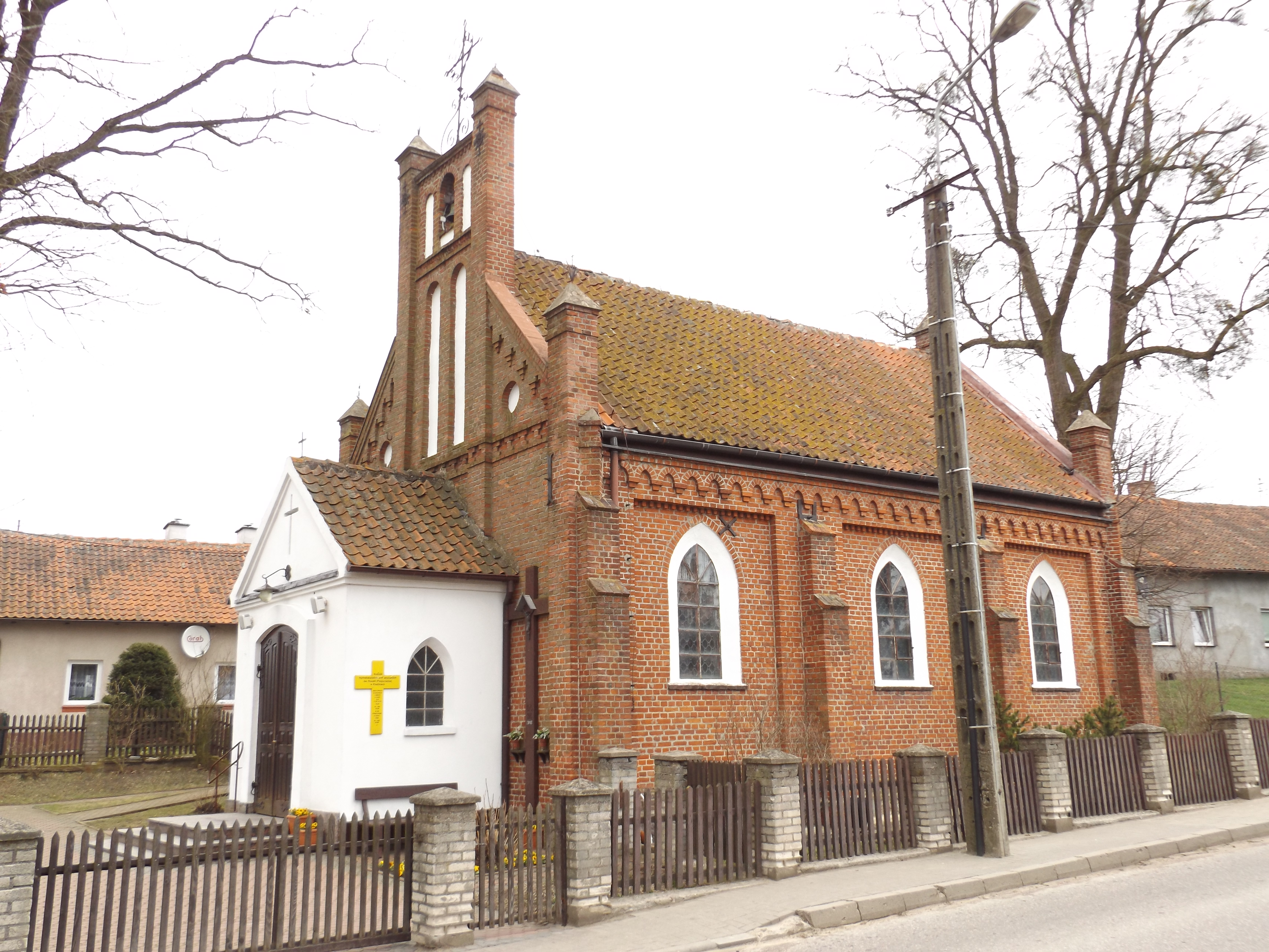 Kaplica pw. św. Rozalii we wsi Kieźliny